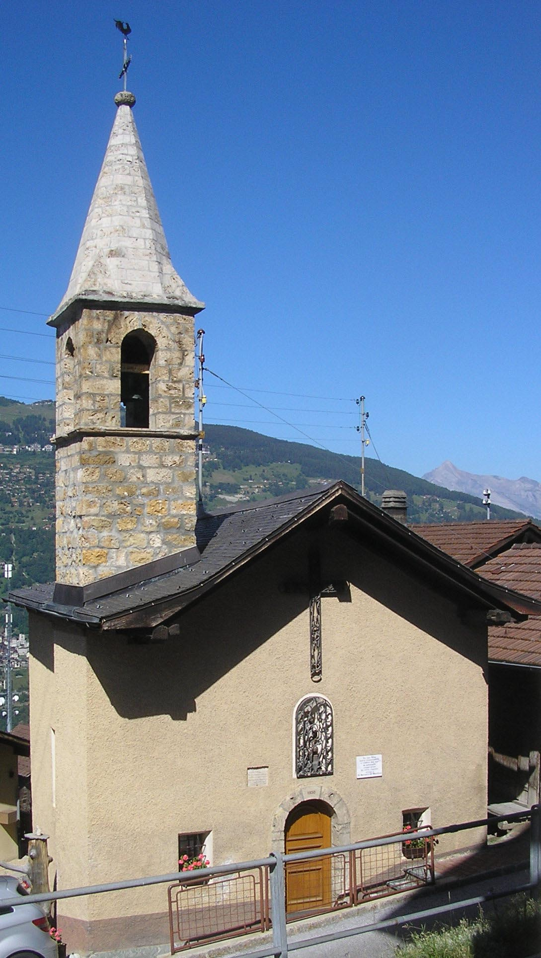 Chapelle de Suen (commune de Saint-Martin, Valais)